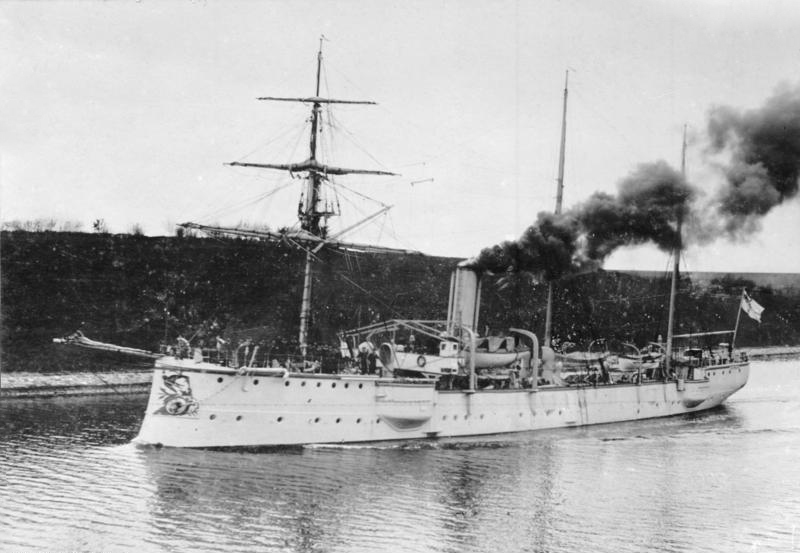 Kleiner Kreuzer "Schwalbe" Schwalbe, Kleiner Kreuzer. Stapell[auf].: 16.8.1887 [Kleiner Kreuzer "SMS Schwalbe" im Kaiser-Wilhelm-Kanal (Nord-Ostsee-Kanal)]